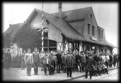 Der Worms-Abenheimer Bahnhof auf der Bahnstrecke Worms-Gundheim in Rheinhessen (Deutschland)